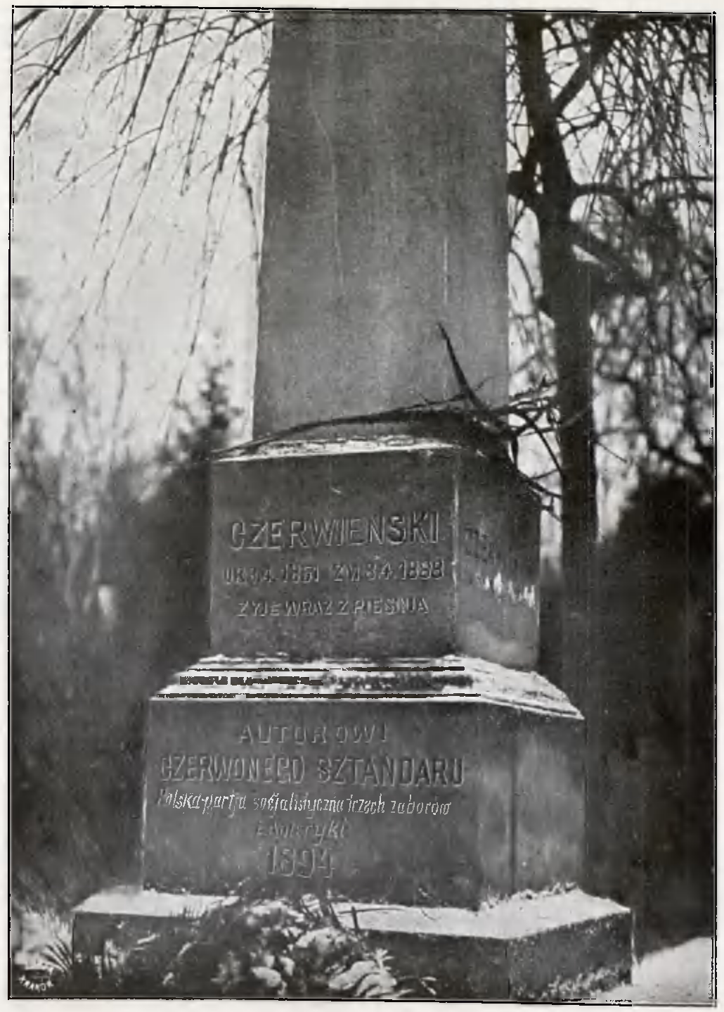 POMNIK BOLESŁAWA CZERWIEŃSKIEGO NA CMENTARZU WE LWOWJE z albumu "Czerwony sztandar. Album ku uczczeniu pamięci Bolesława Czerwieńskiego".